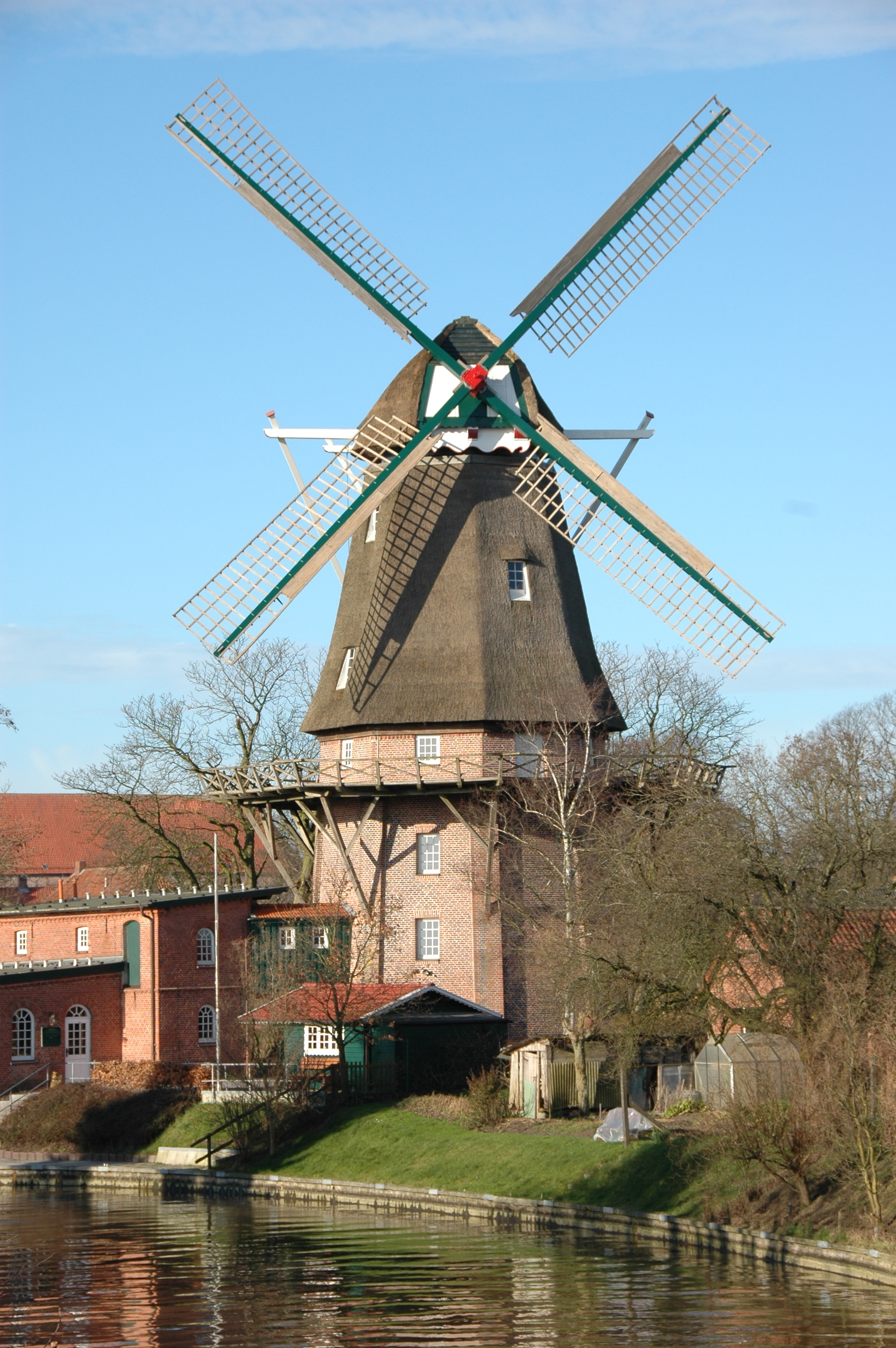 Mühle in Hinte bei Emden. Windmill in Hinte, near Emden, Lower Saxony, Germany.